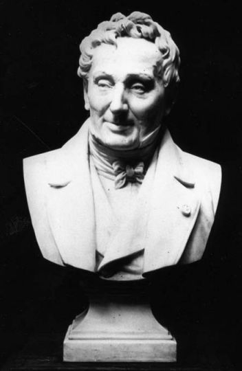 photo du buste